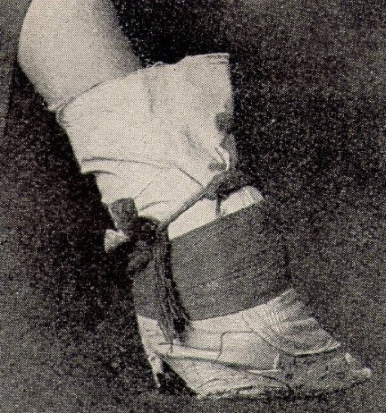 Beispiel für das Füßebinden